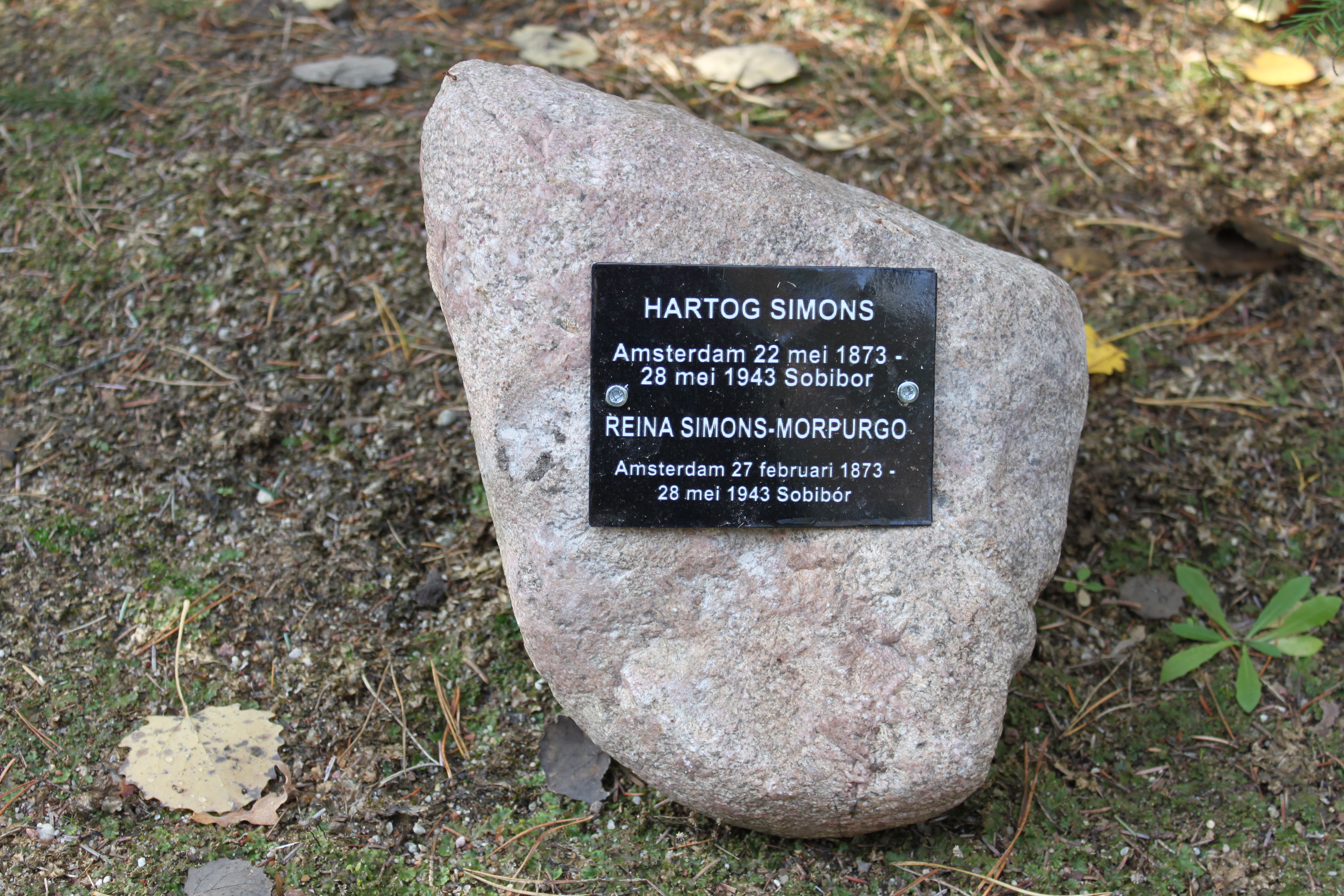 Hartog Simons und Reina Simons-Morpurgo Stein